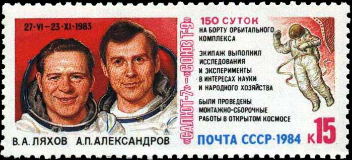 Космонавты СССР Ляхов и Александров